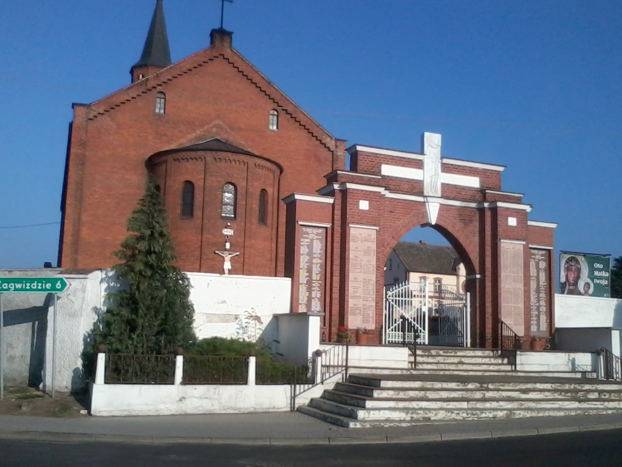 Wejście główne na teren przykościelny